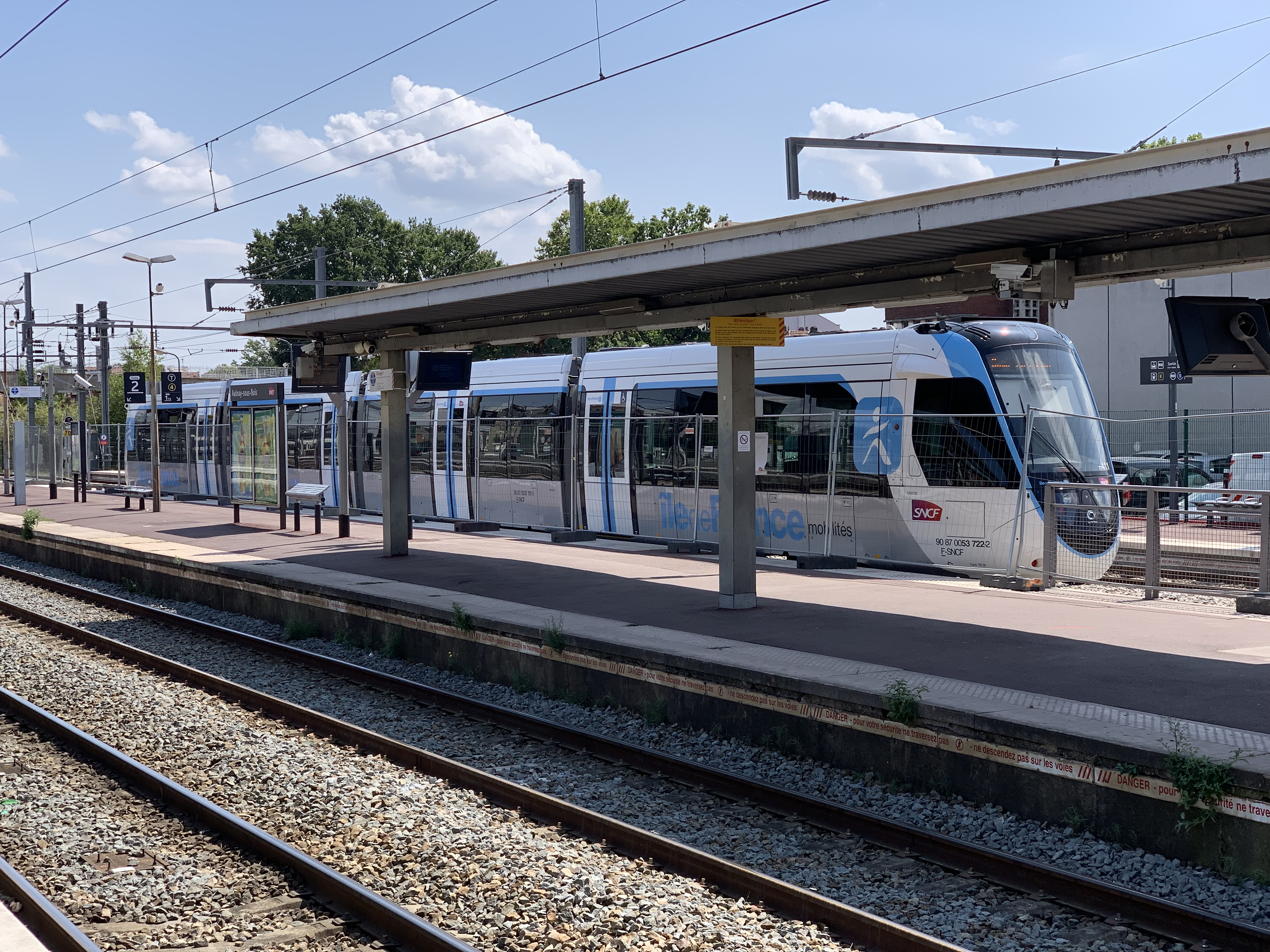 Rame en essai de la ligne 4 du tramway d'Île-de-France en gare d'Aulnay-sous-Bois.